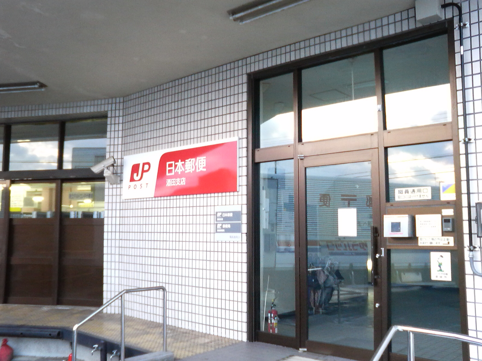 郵便事業酒田支店の看板と職員通用口